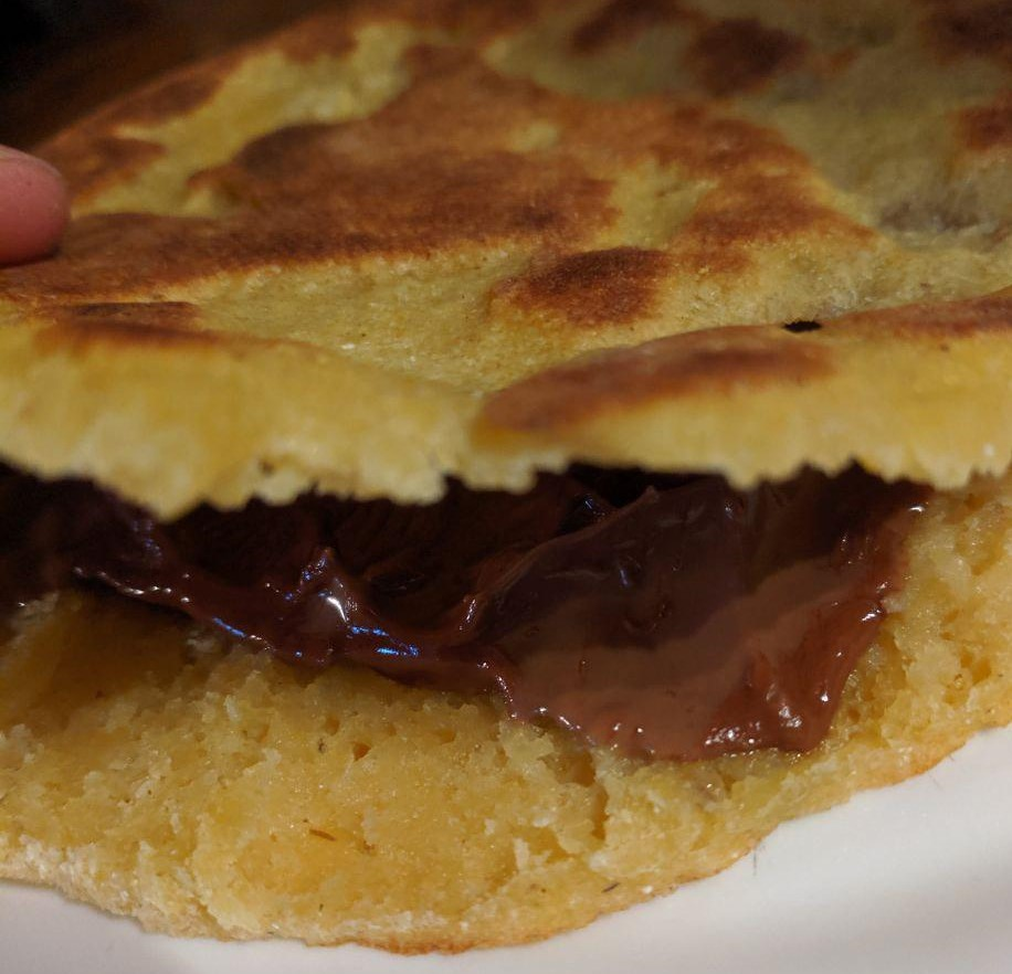 Taloa txokolatearekin. Erratzuko Zubi-punta tabernan egina.